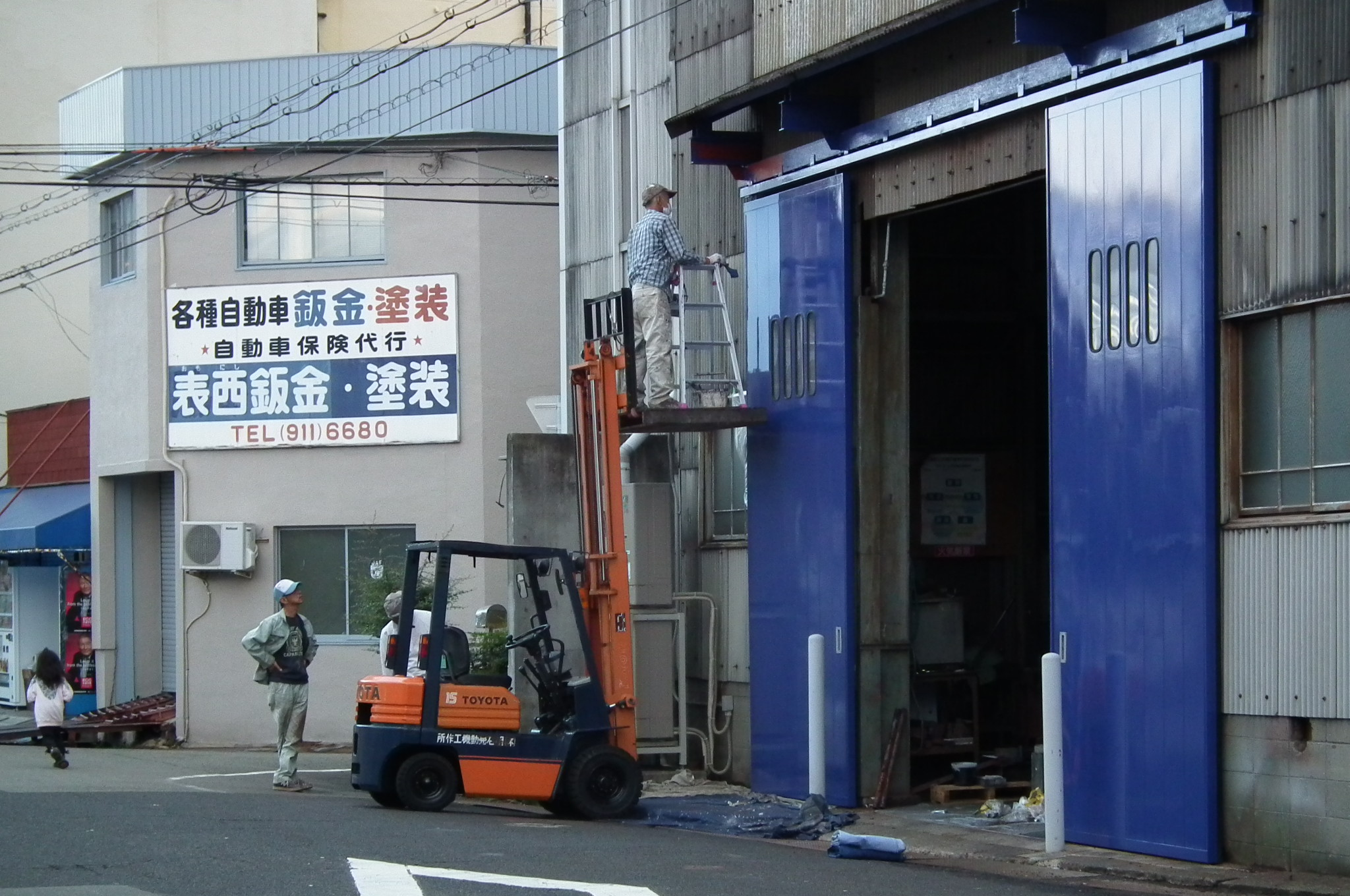 Port of Akashi,明石港 明石市岬町 明石発動機工作所 表西鈑金塗装